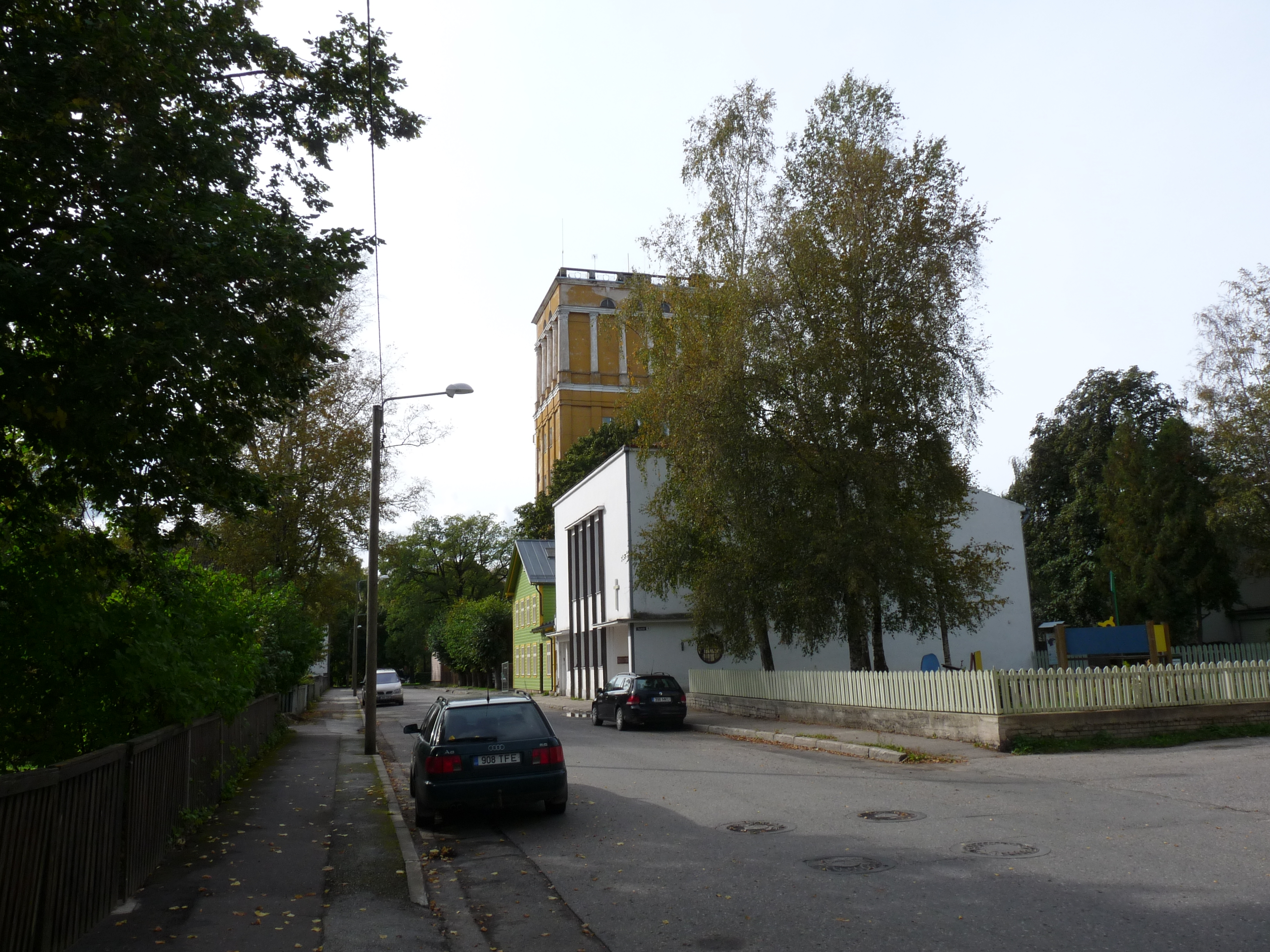 Õpetaja tänav, vaade tänava algusest, taamal Tartu veetorn, 22. september 2012